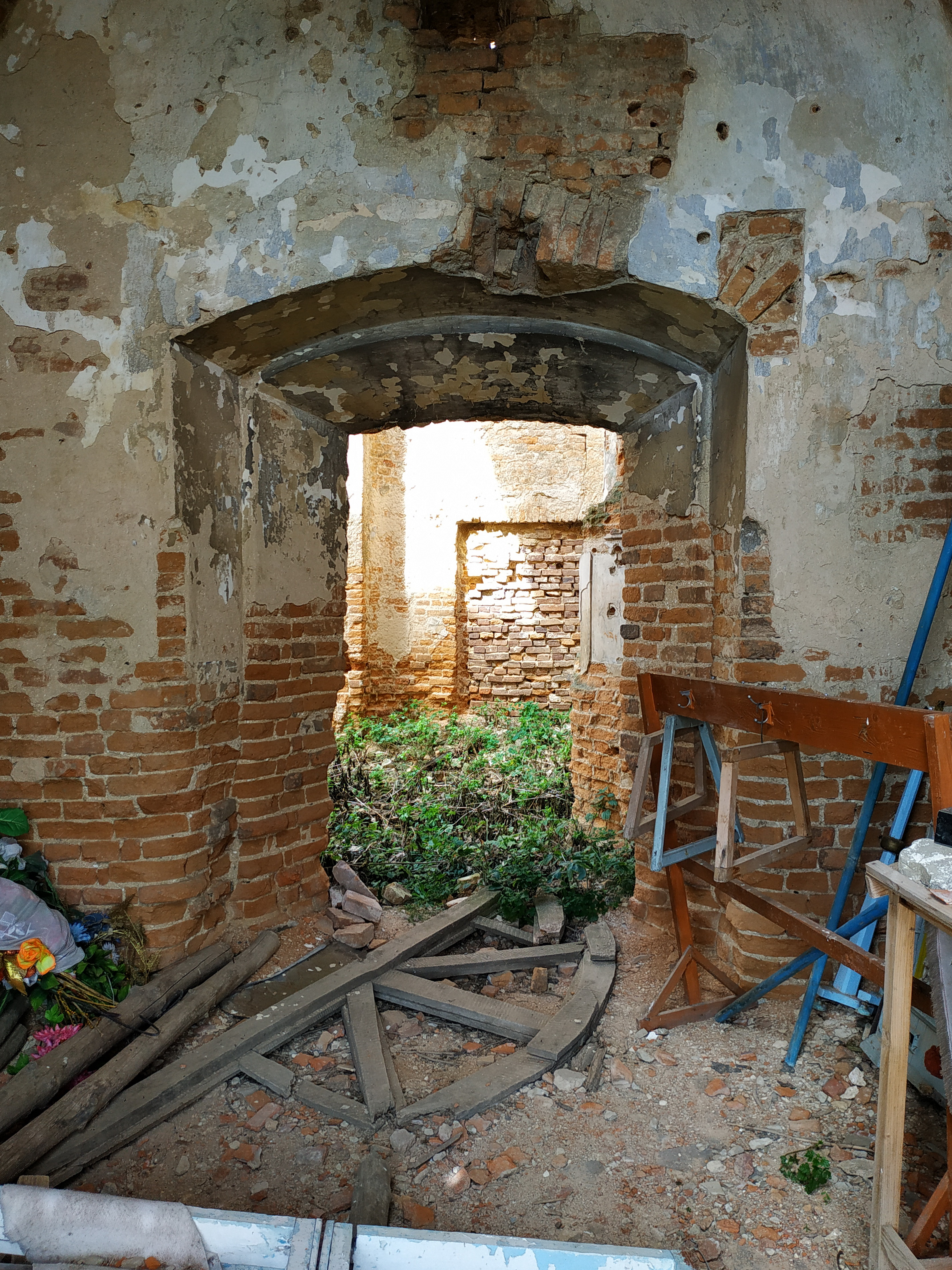 Загорівський монастир (1566 рік) - вигляд всередині - Новий Загорів (на південній околиці села) Локачинський район Волинська область Україна